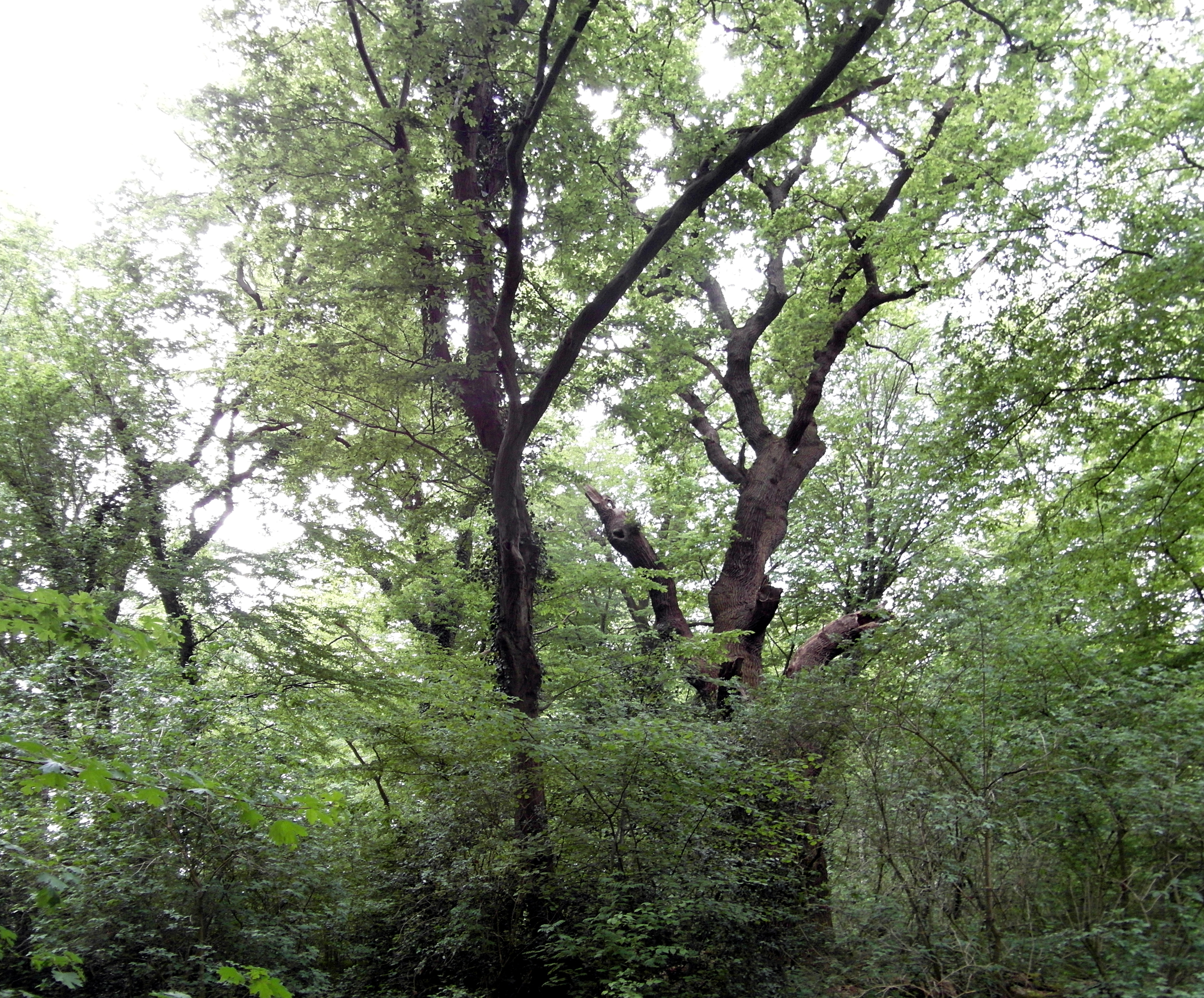 Der Eichenbestand im Süden des Großen Holz bei Kirchwehren ist das Naturdenkmal ND-H 36 (in Form eines Dreieck mit knapp 100 m Kantenlänge)